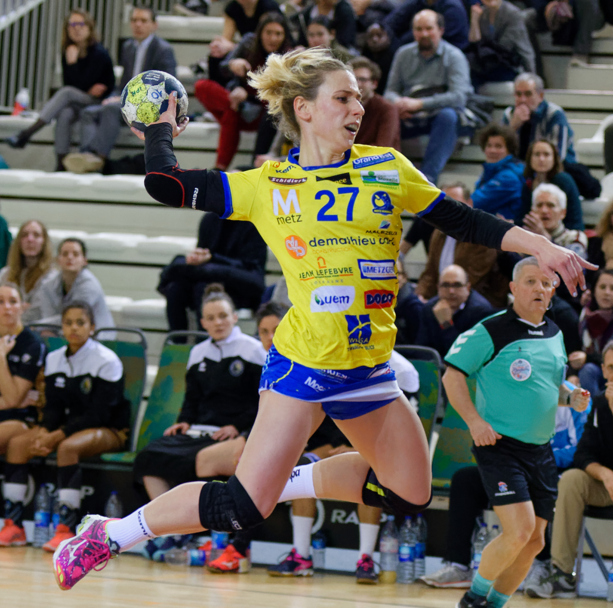 Marion Maubon lors de Issy Paris / Metz Handball. Le 14 mars 2018.